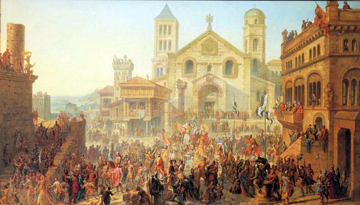 Huile sur toile, H=110 cm ; L = 198 cm. Le tableau est choisi par Auguste Migette pour introduire son catalogue. Il fait partie d'une série de neuf grandes toiles consacrées à l'histoire de Metz. Il représente l'élection d'Almobert en 1055, premier maître échevin, devant l'ancienne basilique (à l'emplacement de la cathédrale St-Étienne). Sur la gauche on aperçoit les ruines d'un bâtiment romain à l'emplacement de l'actuel marché couvert, à droite la tour Charlemagne, et au fond les anciennes fortifications.